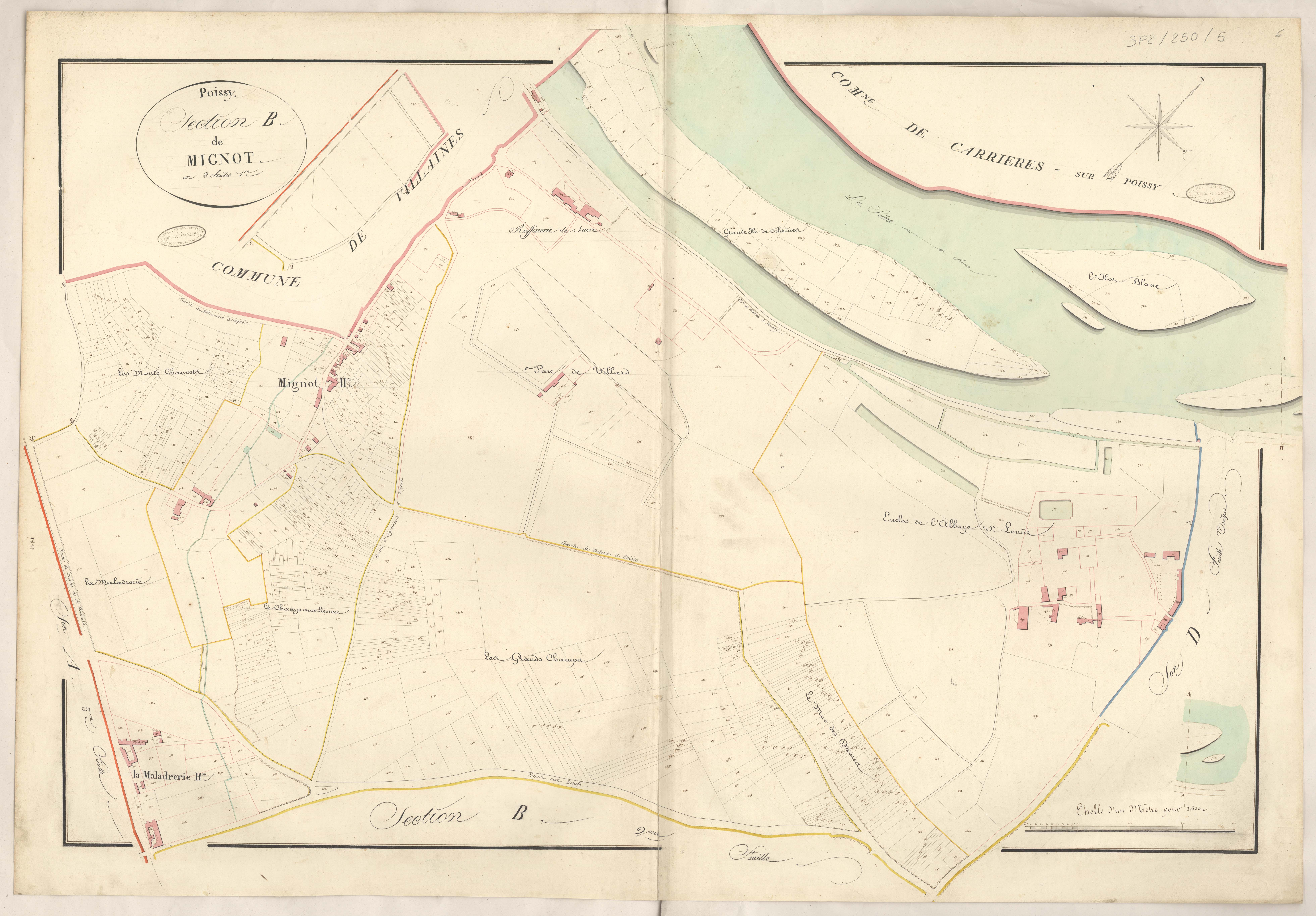 Cadastre Napoléonien de Poissy, 98cm X 68cm, section B1 de Mignot